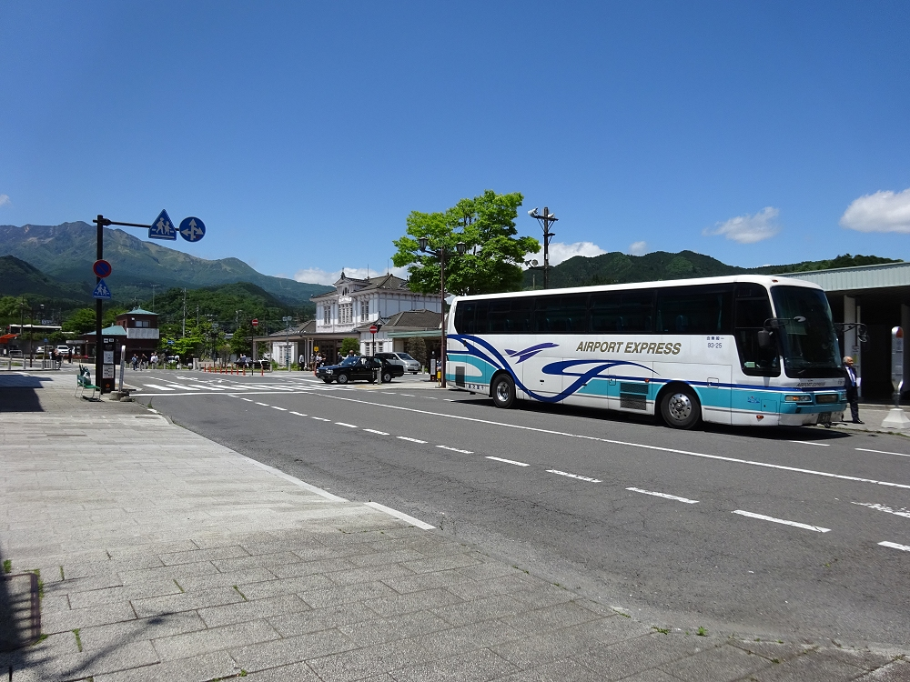 マロニエ号成田線 日光駅乗り入れ